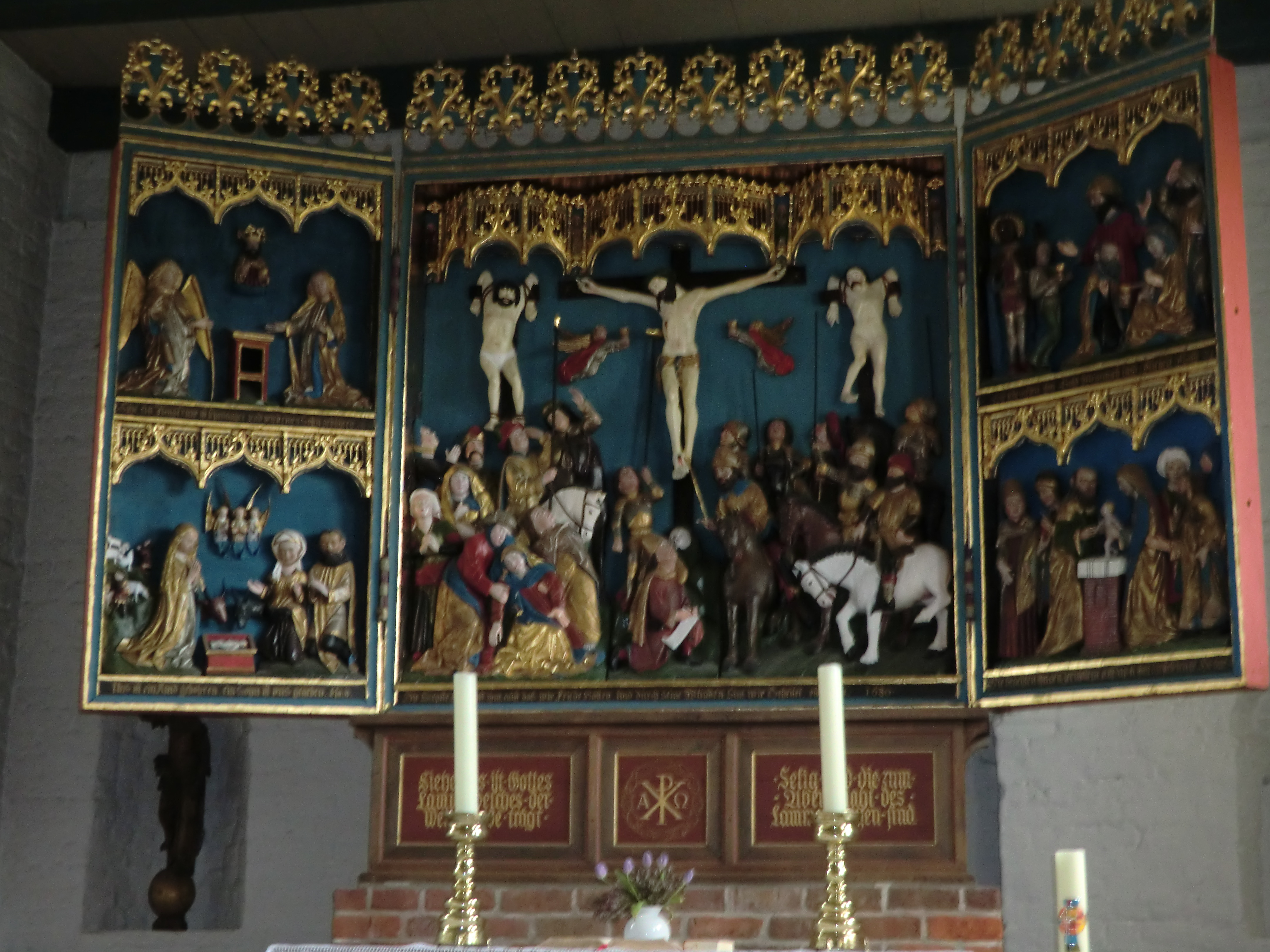 Flügelaltar